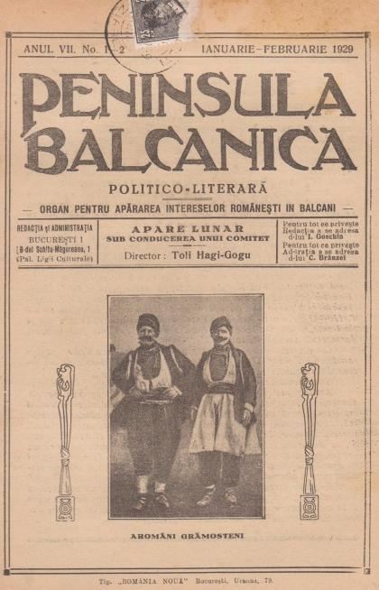 Пенинсула Балканика, януари - февруари 1929